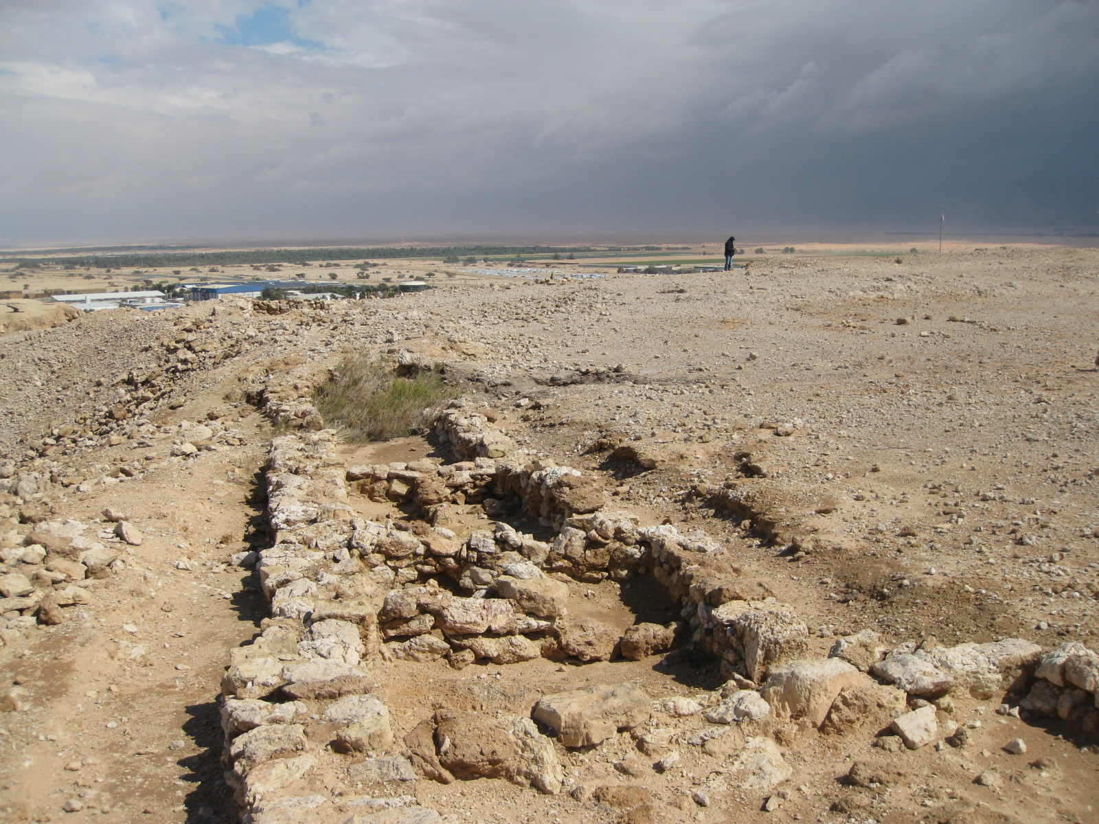 מצודת יוטבתה מתקופת הברזל -אלמנט הגנתי הסוגר את המצודה ממערב ומצפון, במקום זה הגבעה משתפלת לכיוון צפון